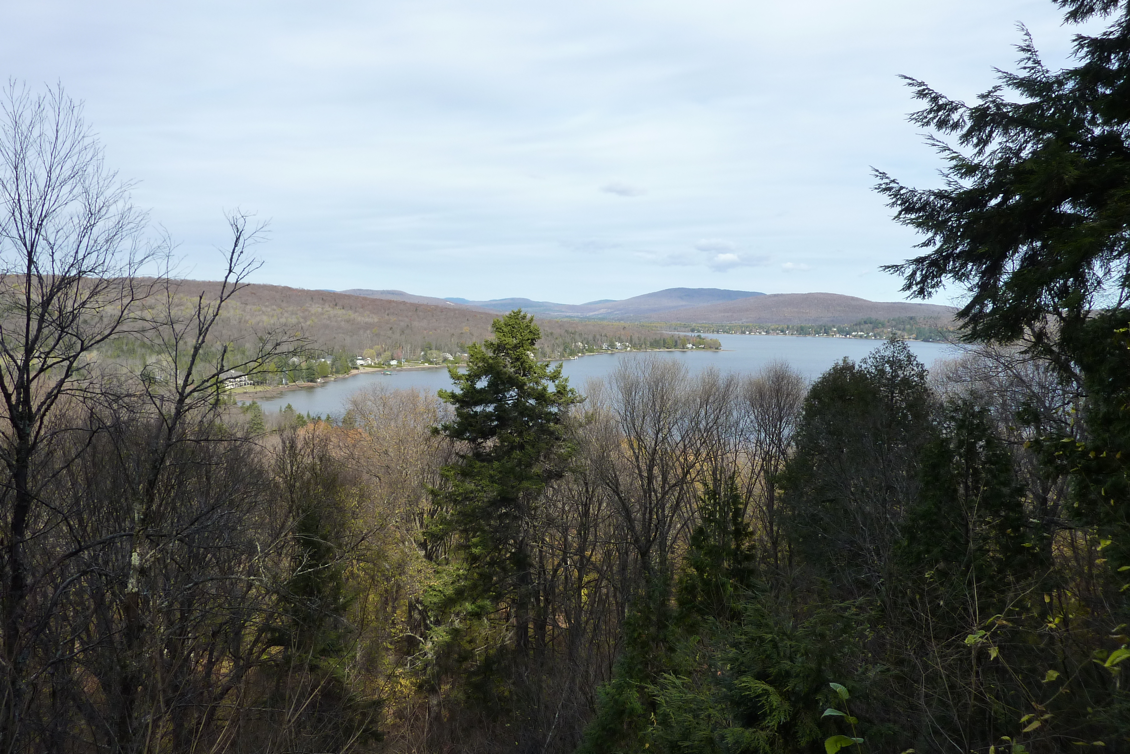 Lac Saint-Joseph